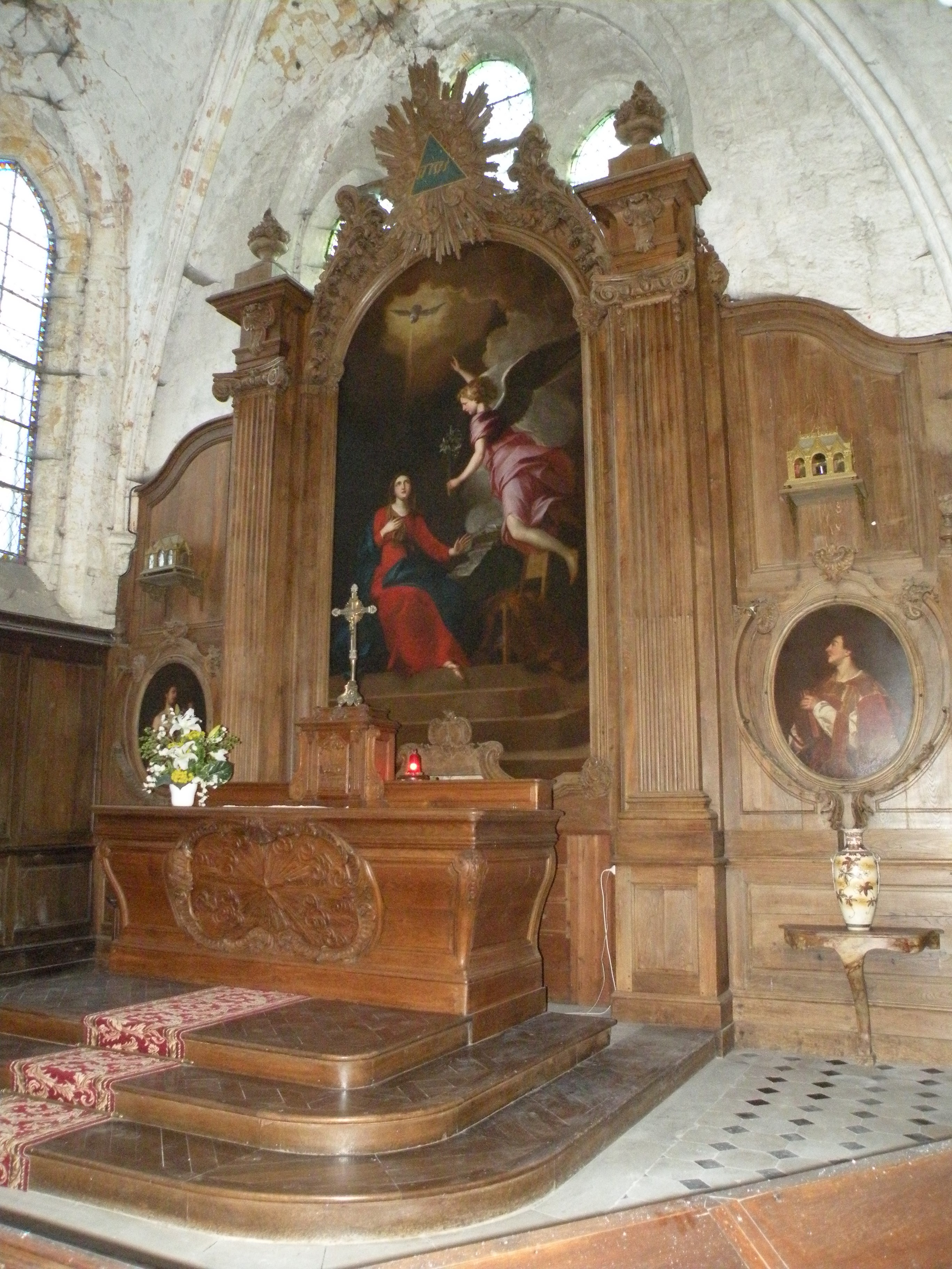 Église Notre-Dame de l'Annonciation d'Allonne - ensemble du maître-autel (autel, tabernacle, retable, trois tableaux, 1re moitié XVIIIe siècle.